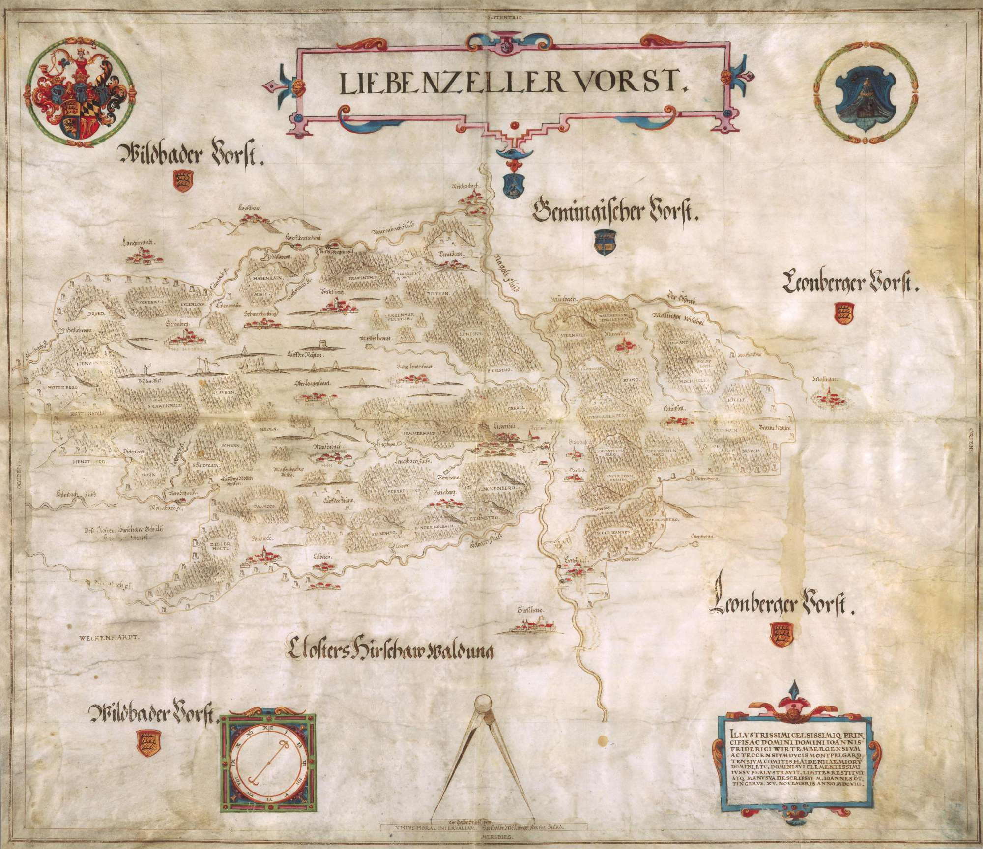 Liebenzeller Vorst: Karte (73 x 64 cm), Aquarellzeichnung auf Pergament, 1608 geschaffen von dem Geografen und Kartografen Johannes Oettinger. (Landesarchiv Baden-Württemberg, Abt. Hauptstaatsarchiv Stuttgart, N 3 Nr. 7)